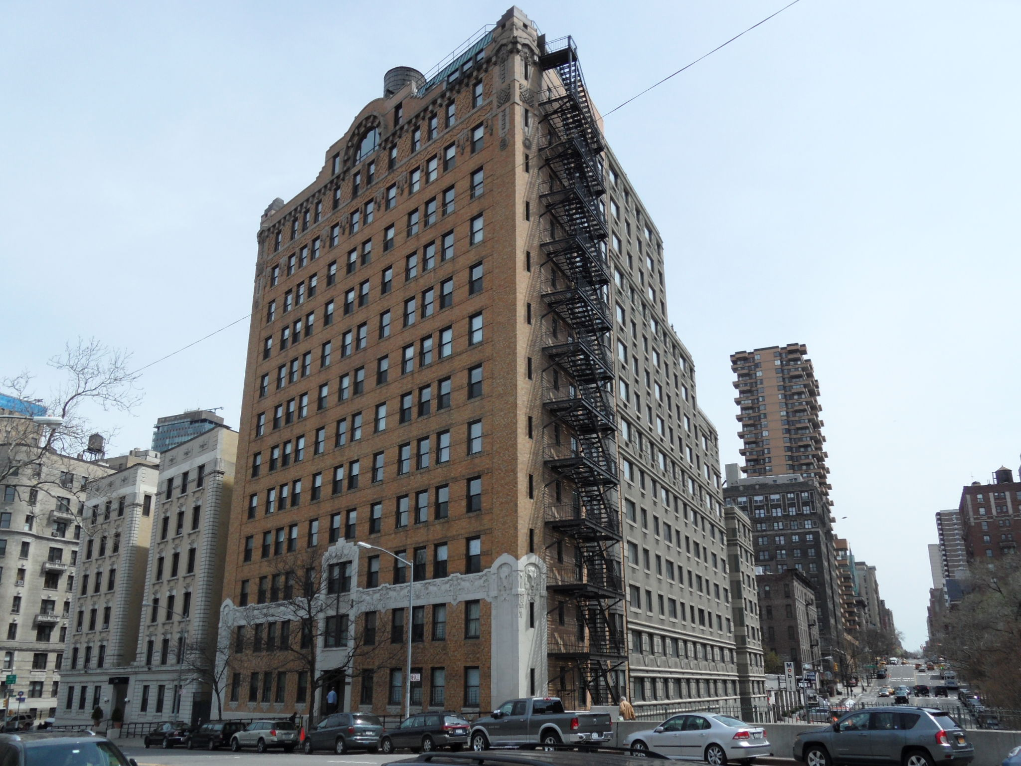 Frontansicht des Hauses 243 Riverside Drive in Manhattan NY, in diesem Haus wohnte Uwe Johnson, während seines USA Aufenthaltes, es ist auch Handlungsort in seinem Roman Jahrestage.